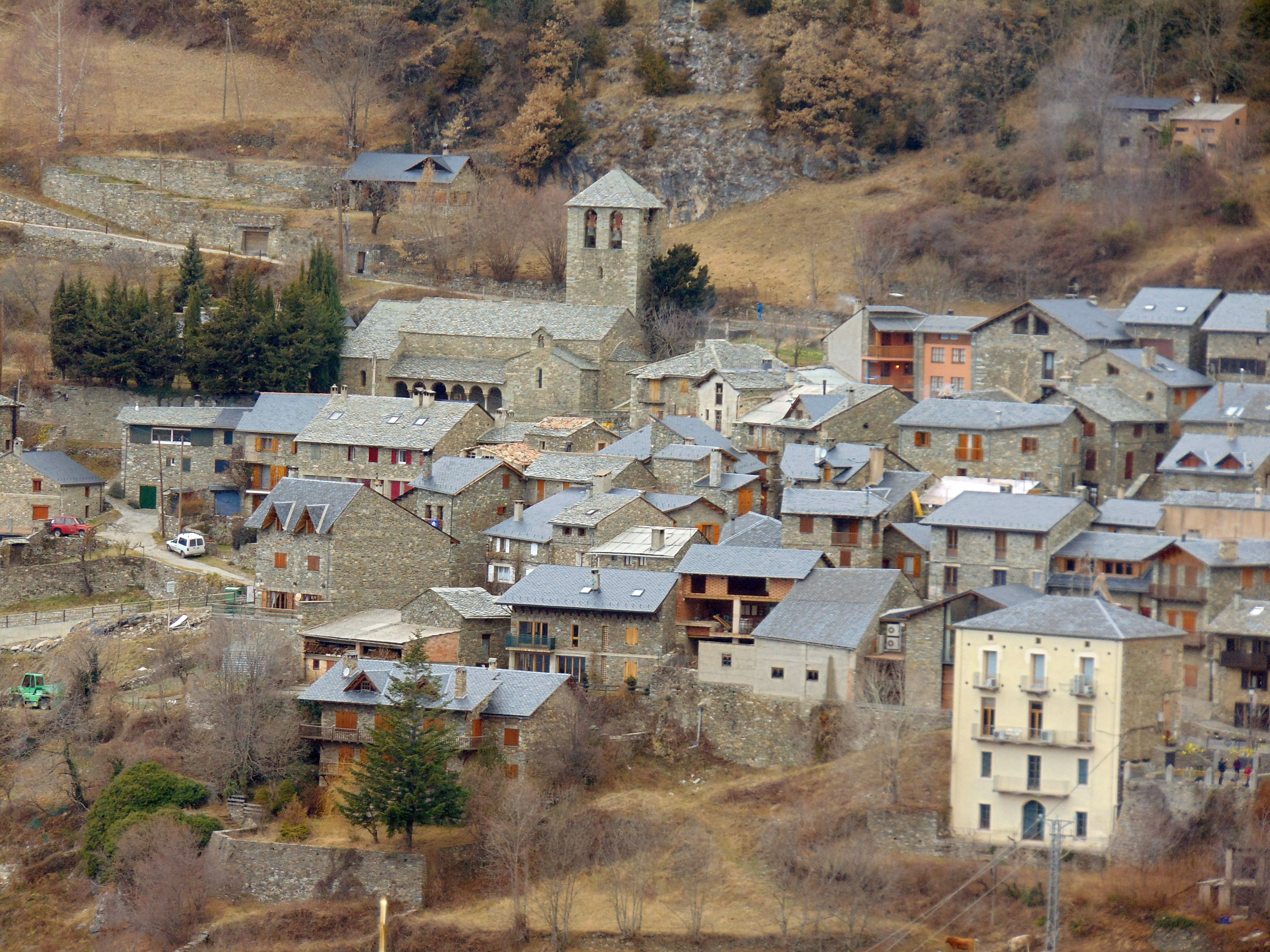 Església de Sant Jaume de Queralbs